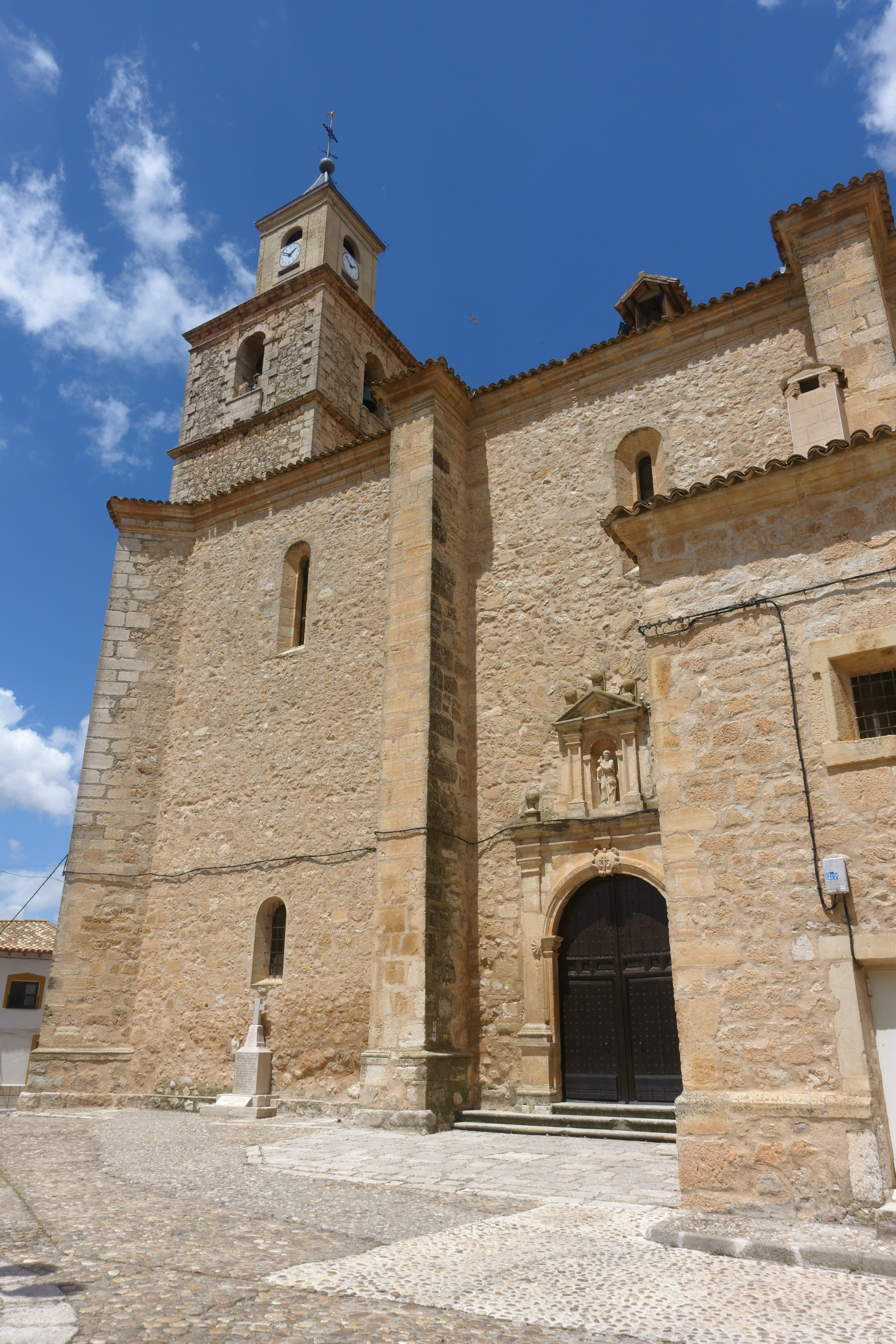 Iglesia de Nuestra Señora de la Asunción, Villamayor de Santiago (Cuenca, España).